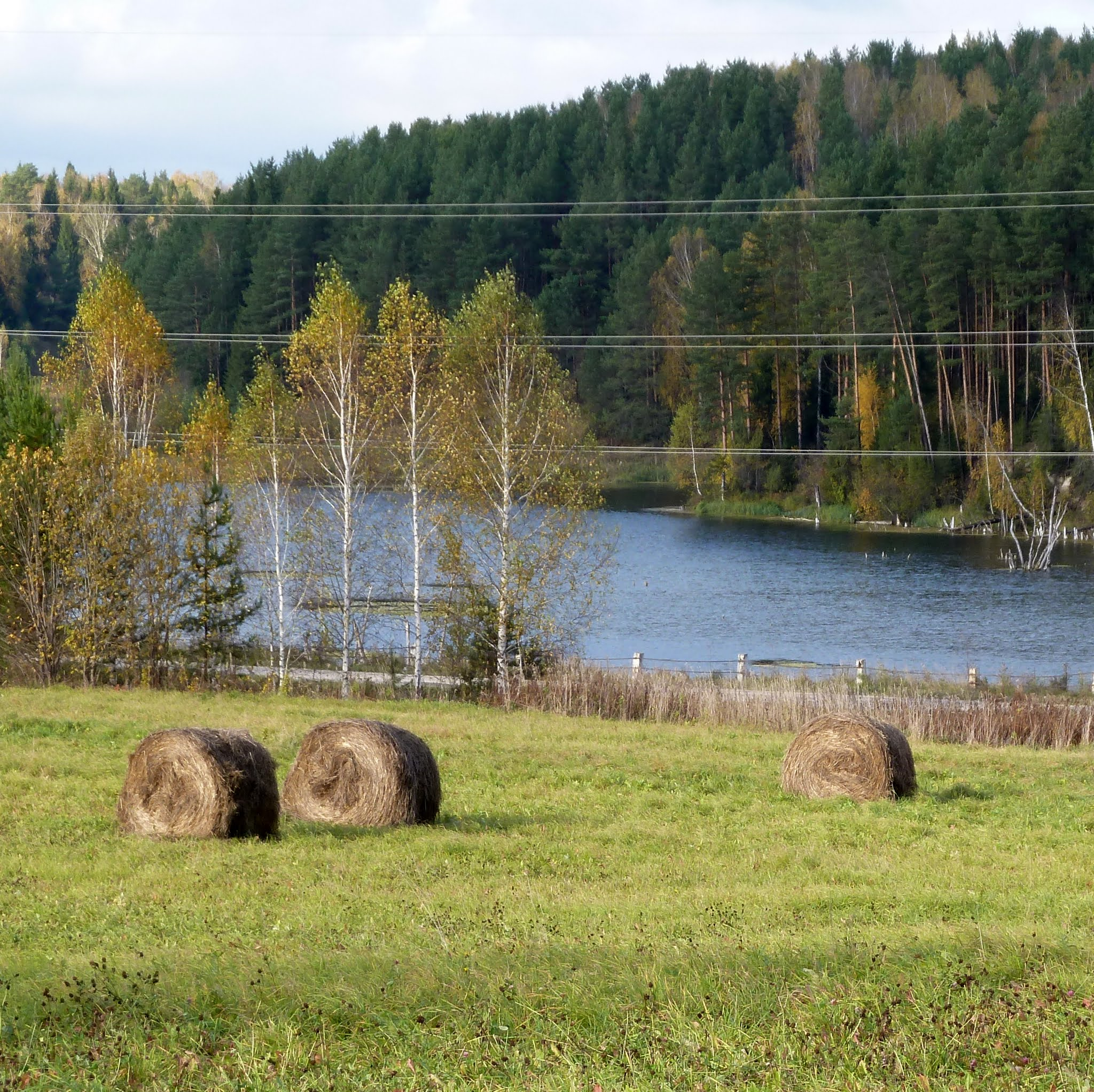 Район Суды